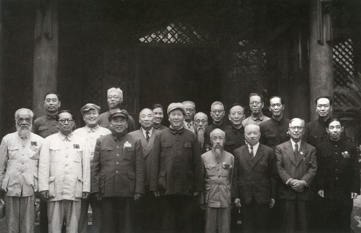 1949年，北京成立新政协筹备会，图为筹备会常委合影。前排右起：沈雁冰、陈嘉庚、李济深、沈钧儒、毛泽东、朱德、章伯钧、谭平山。中排右起：乌兰夫、蔡廷锴、郭沫若、陈叔通、马寅初、黄炎培。后排右起：李立三、马叙伦、张奚若、蔡畅、林伯渠、周恩来。